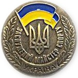 Знак к почётному спортивному званию «Заслуженный мастер спорта Украины»